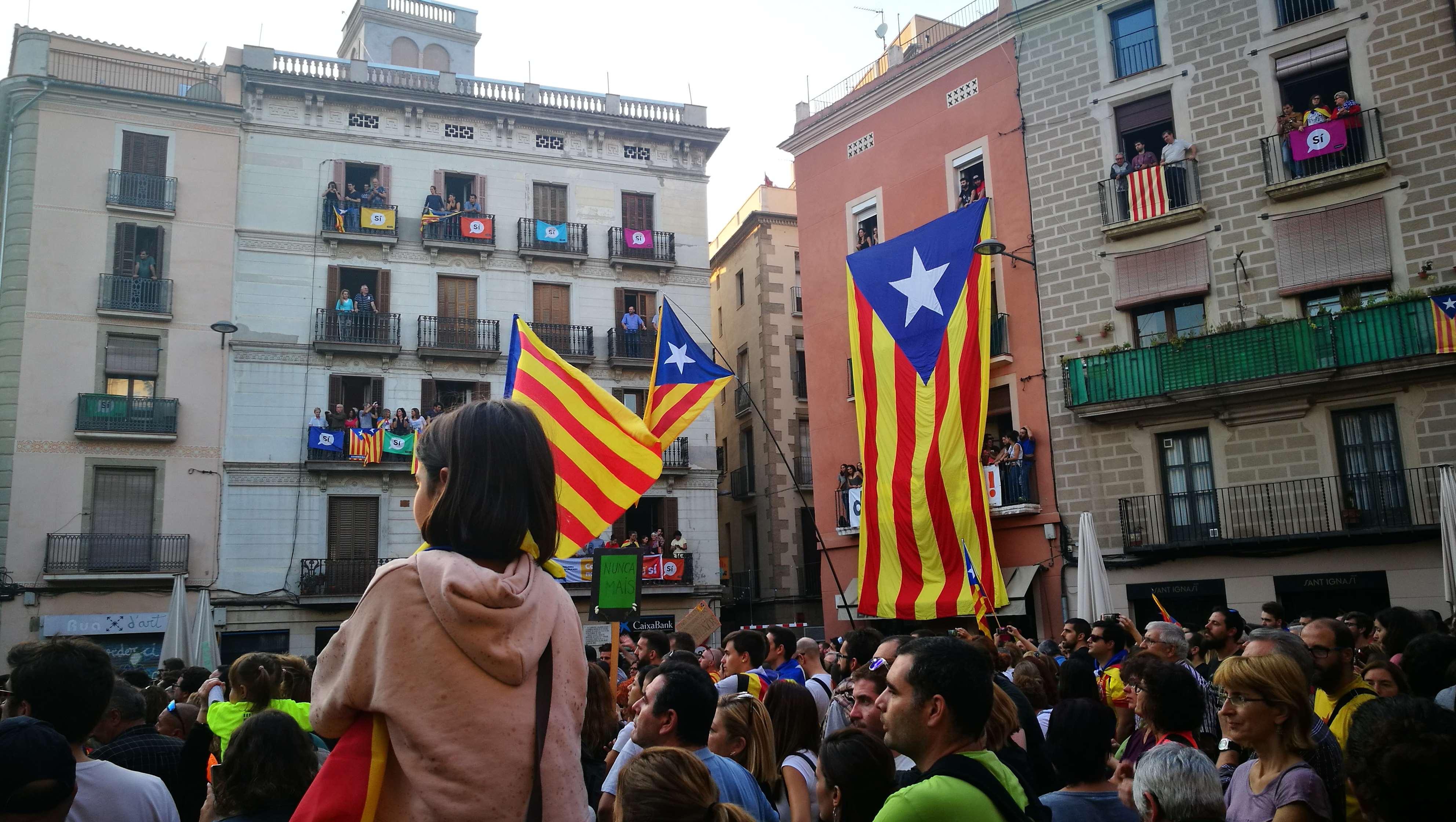 desplegament d'una estelada gegant a la Plaça Major de Manresa durant la manifestació del 3 d'octubre de 2017